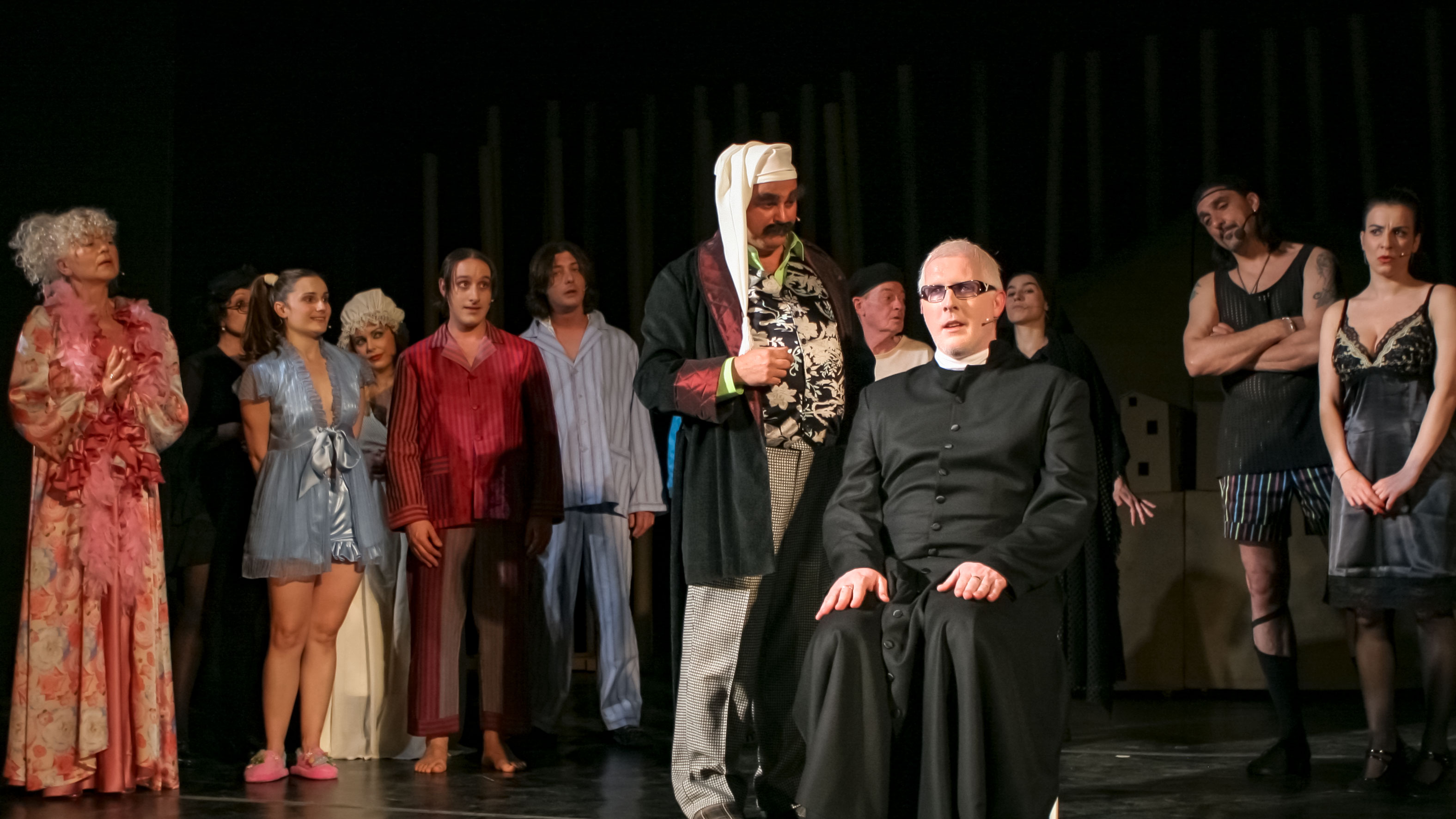 Mario Battifiaca kao Don Silvester u glazbenoj komediji "Aggiungi un posto a tavola", 2009. godine.